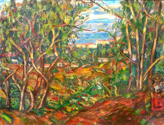 Tableau Paysage du Midi (Hauts de Cagnes), de Léon Weissberg